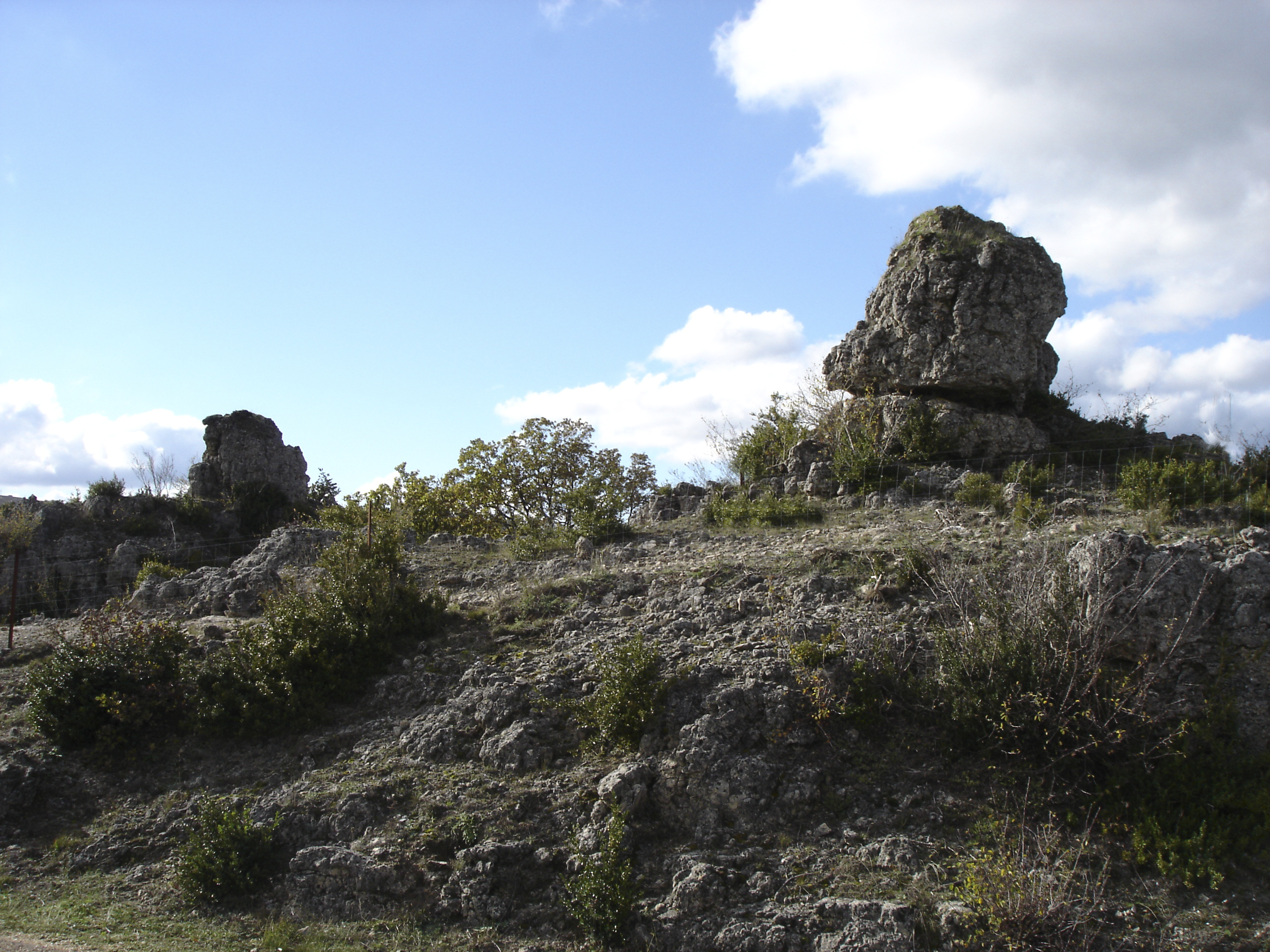 Rocher du Larzac